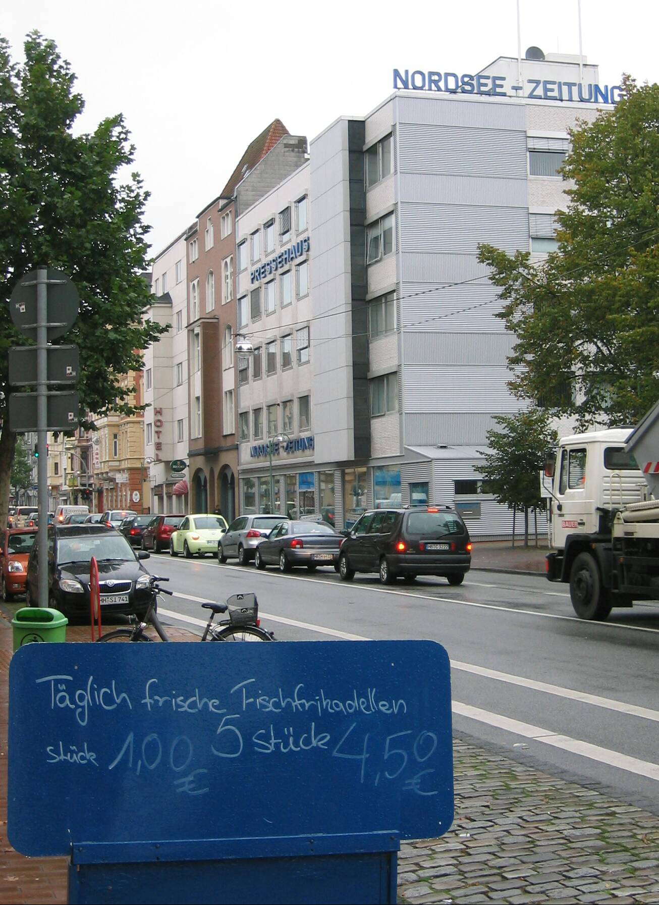 Lehe: Nordsee-Zeitung in der Hafenstraße